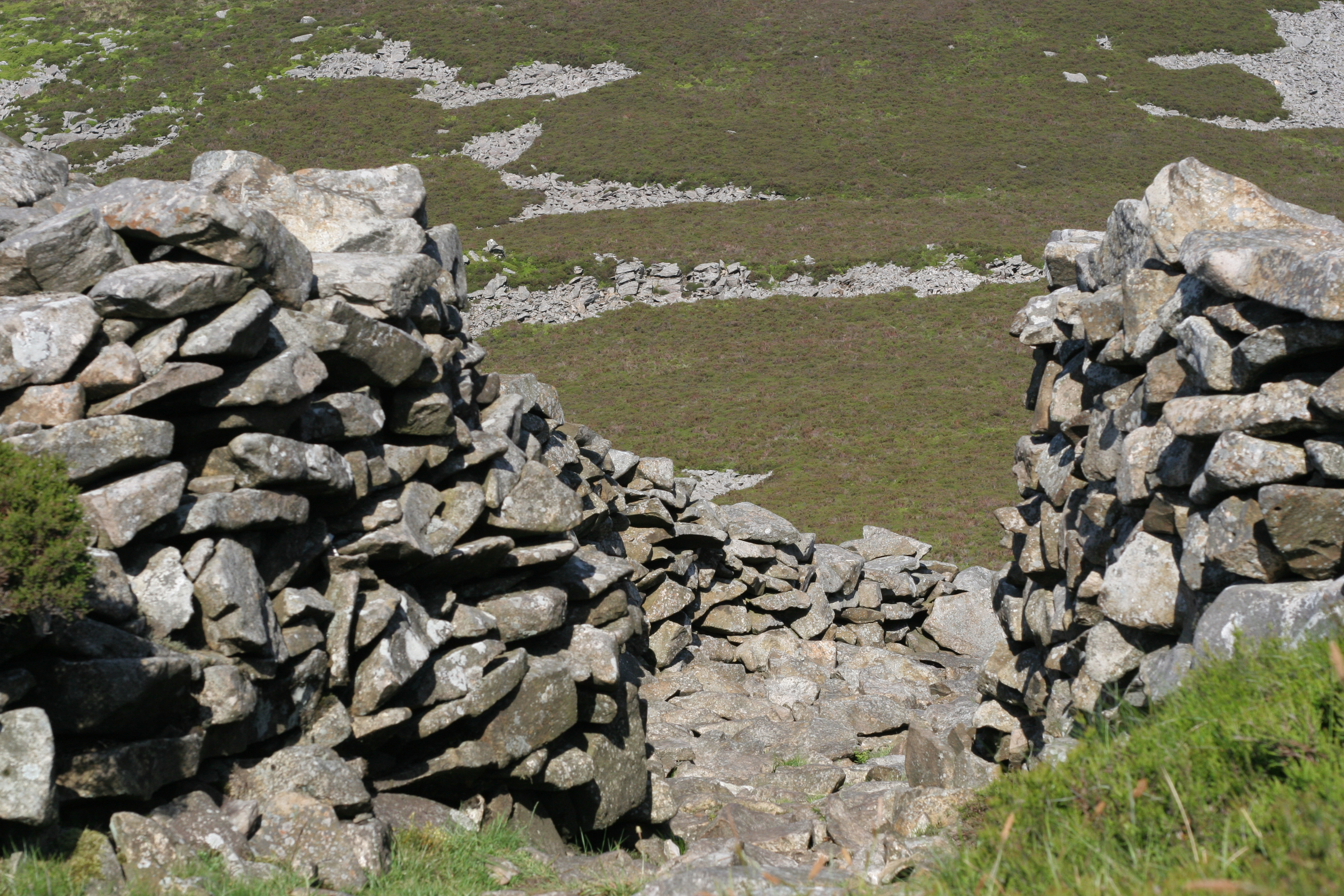 Tre'r Ceiri, Gwynedd 07/06/2006 Rhion Pritchard : own work